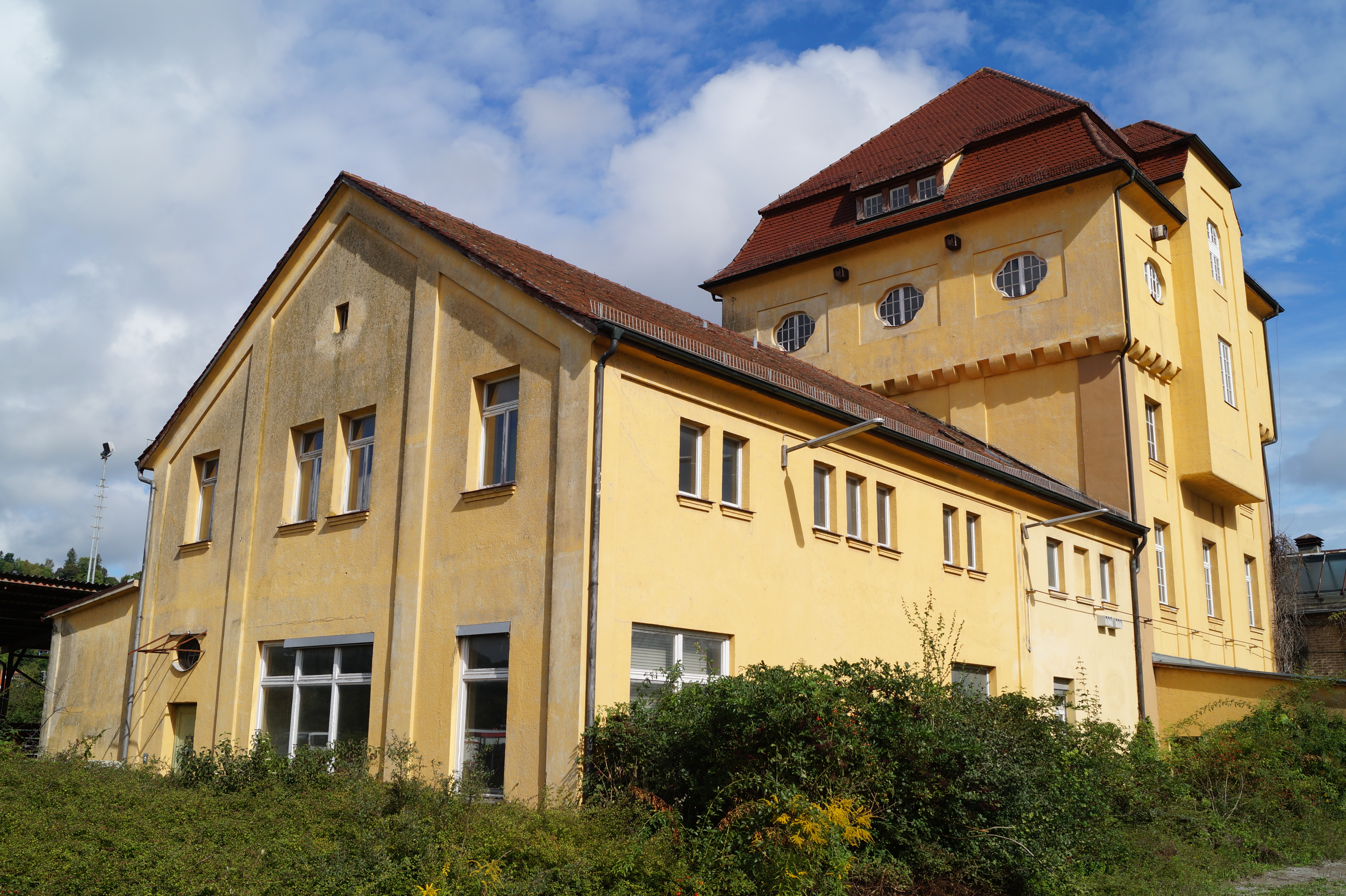 Bahnbetriebswerk Tübingen, am Tag des offenen Denkmals 2017